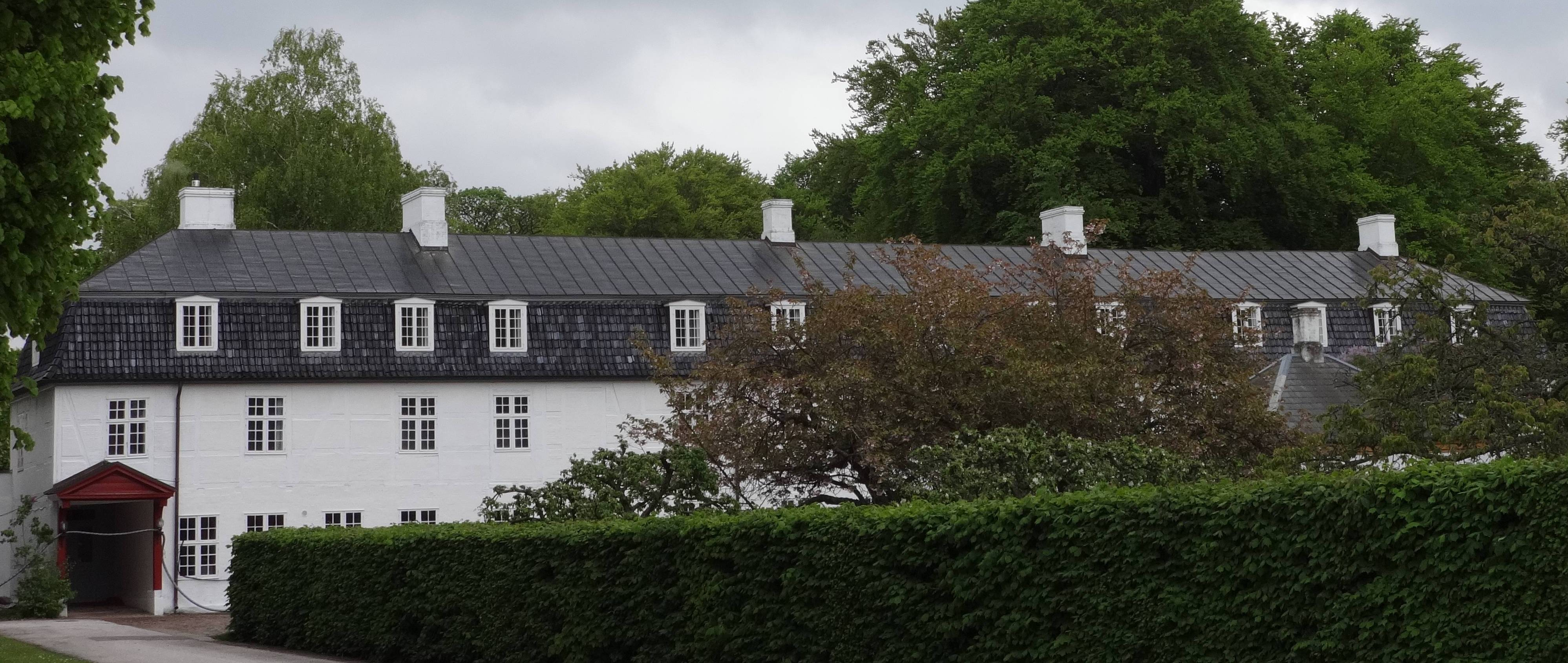 Schloss Sorgenfri: Seitenflügel DamebygningenDansk: Sorgenfri Slot: Damebygningen